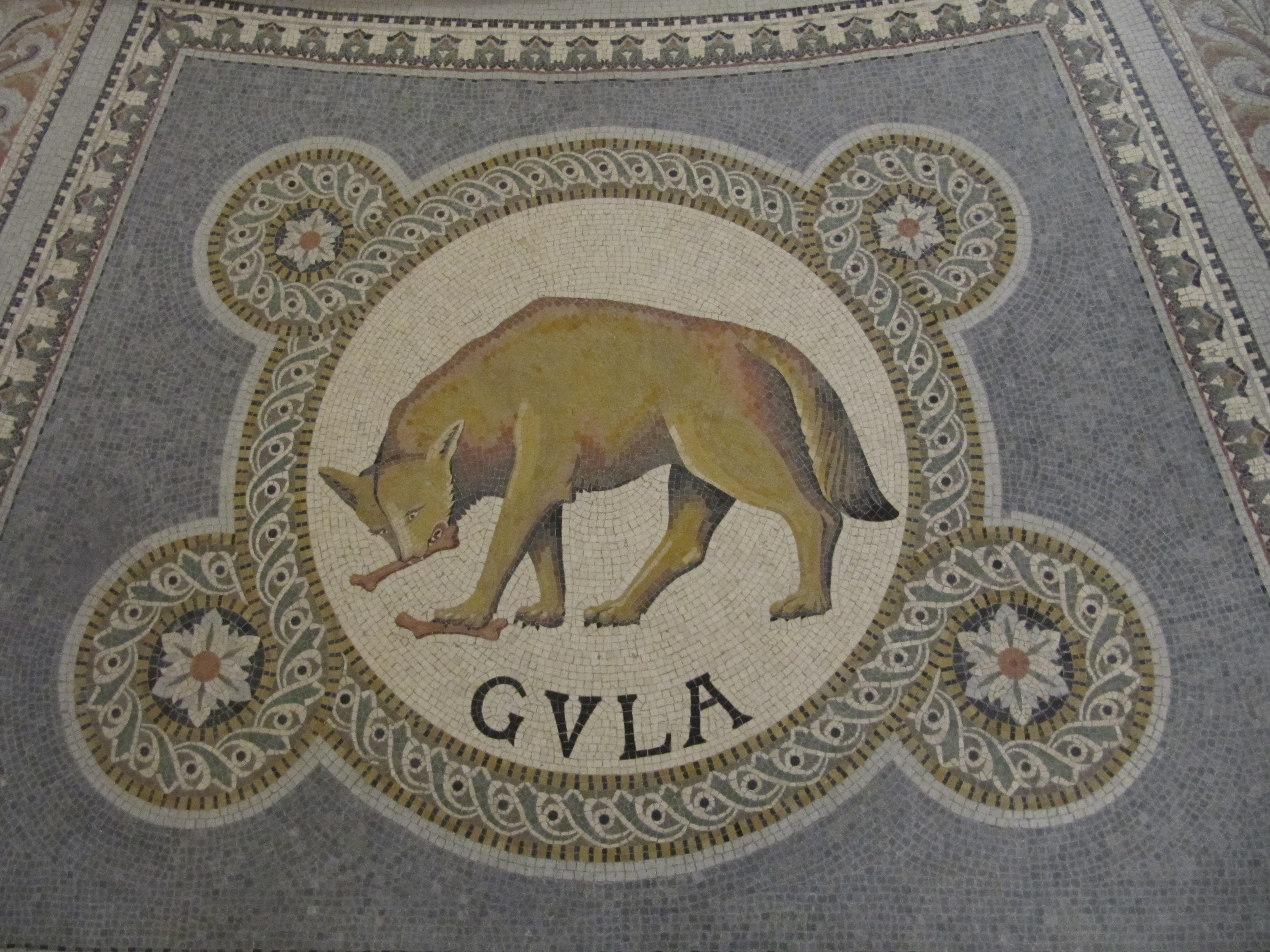 Обжорство - мозаика, алтарная часть крипты базилики Нотр-Дам-де-Фурвьер, Лион, Франция